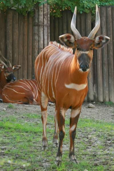 Antilopa bongo